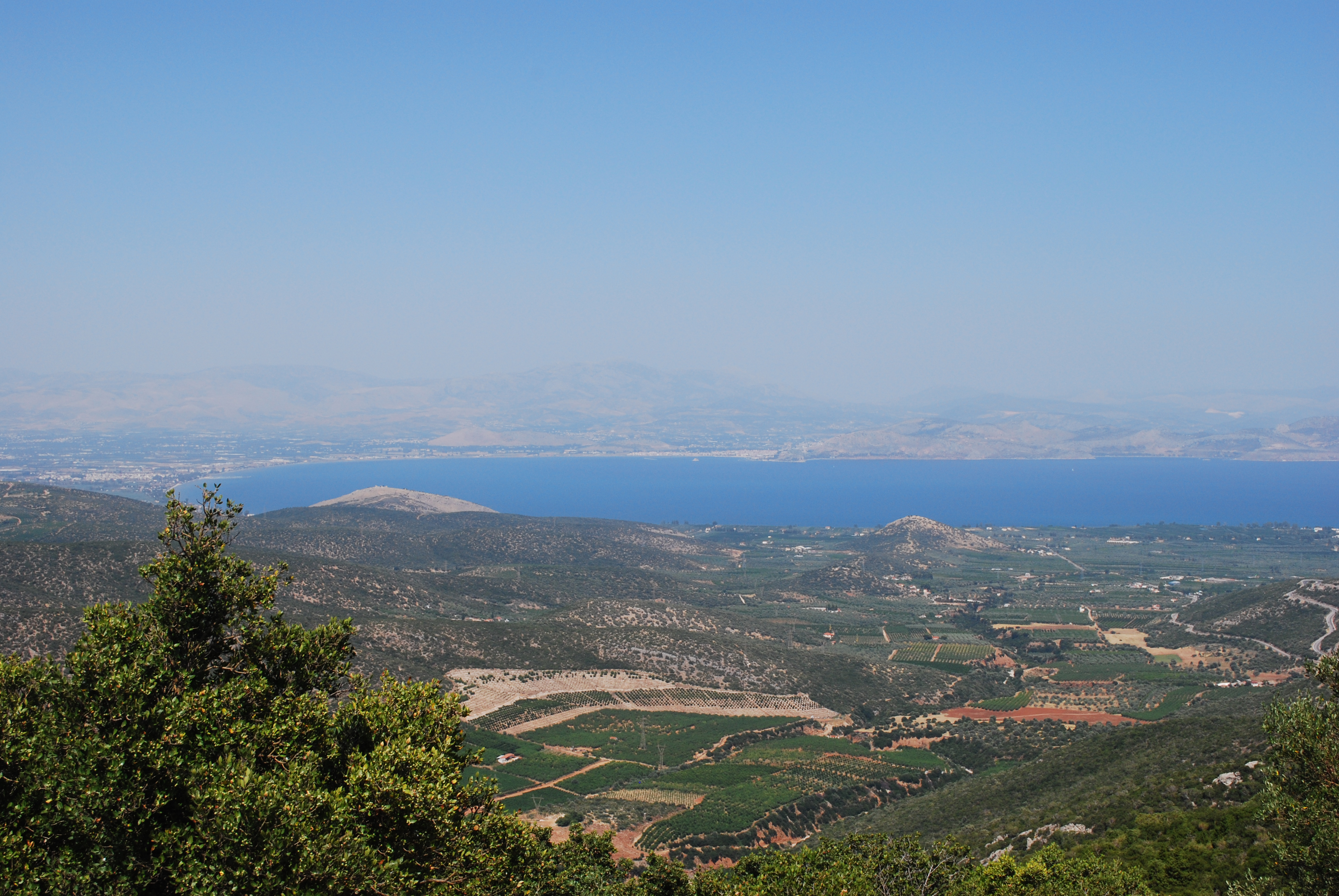 Baie de Nauplie dans la région du Péloponnèse en Grèce en juillet 2009.